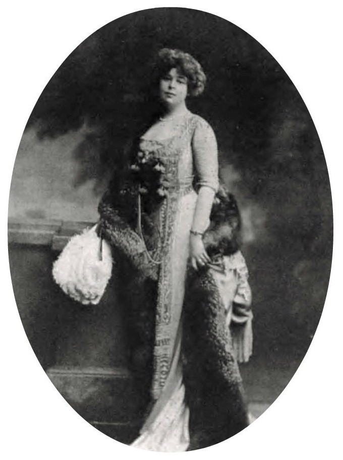 Княгиня Ольга Васильевна Кочубей, ур. Шереметева (1874—1967) , в первом браке с 1894 года супруга Павла Александровича Демидова. После развода вторым браком за князем Михаилом Михайловичем Кочубеем (1860—1937)